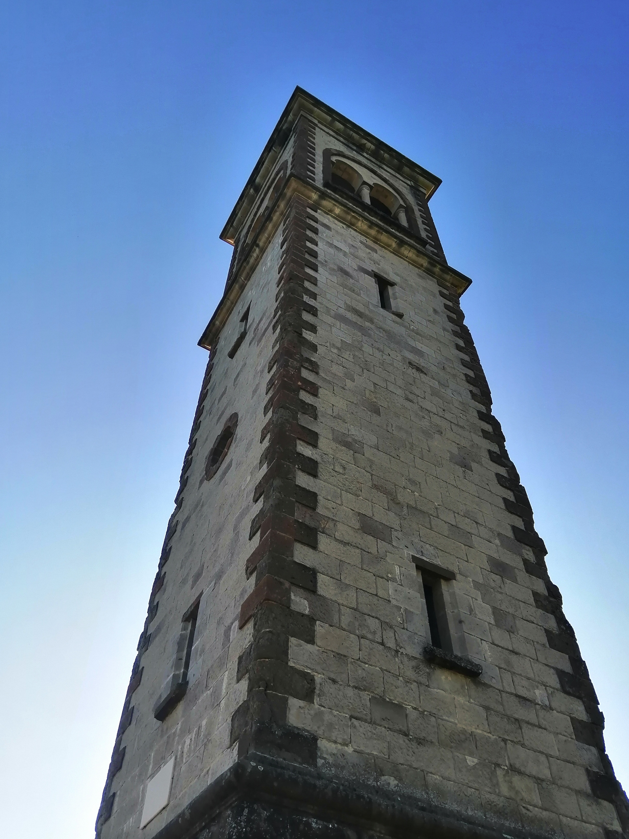 Campanile di San Lorenzo, costruito nel 1938 in prossimità della chiesa parrocchiale del capoluogo.